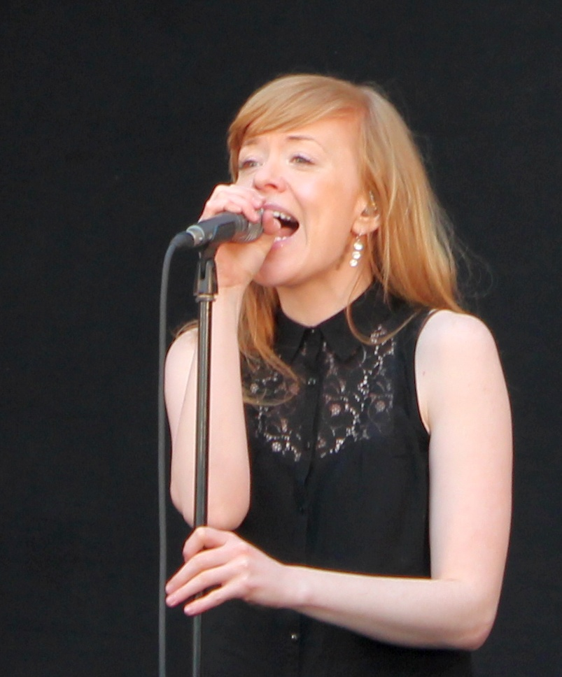 Marvi Vallaste laulmas backi Ott Leplandi viimasel kontserdil enne ärasõitu Eurovisioni lauluvõistlusele 13. mail 2012 Kristiine keskuse aatriumis